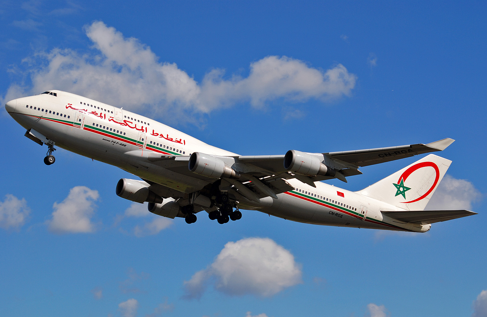 Boeing 747-428 Amsterdam schiphol [AMS / EHAM] 27-06-2007